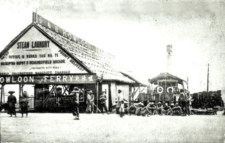 中文（香港）: 第一代香港中環天星碼頭（1890年）。